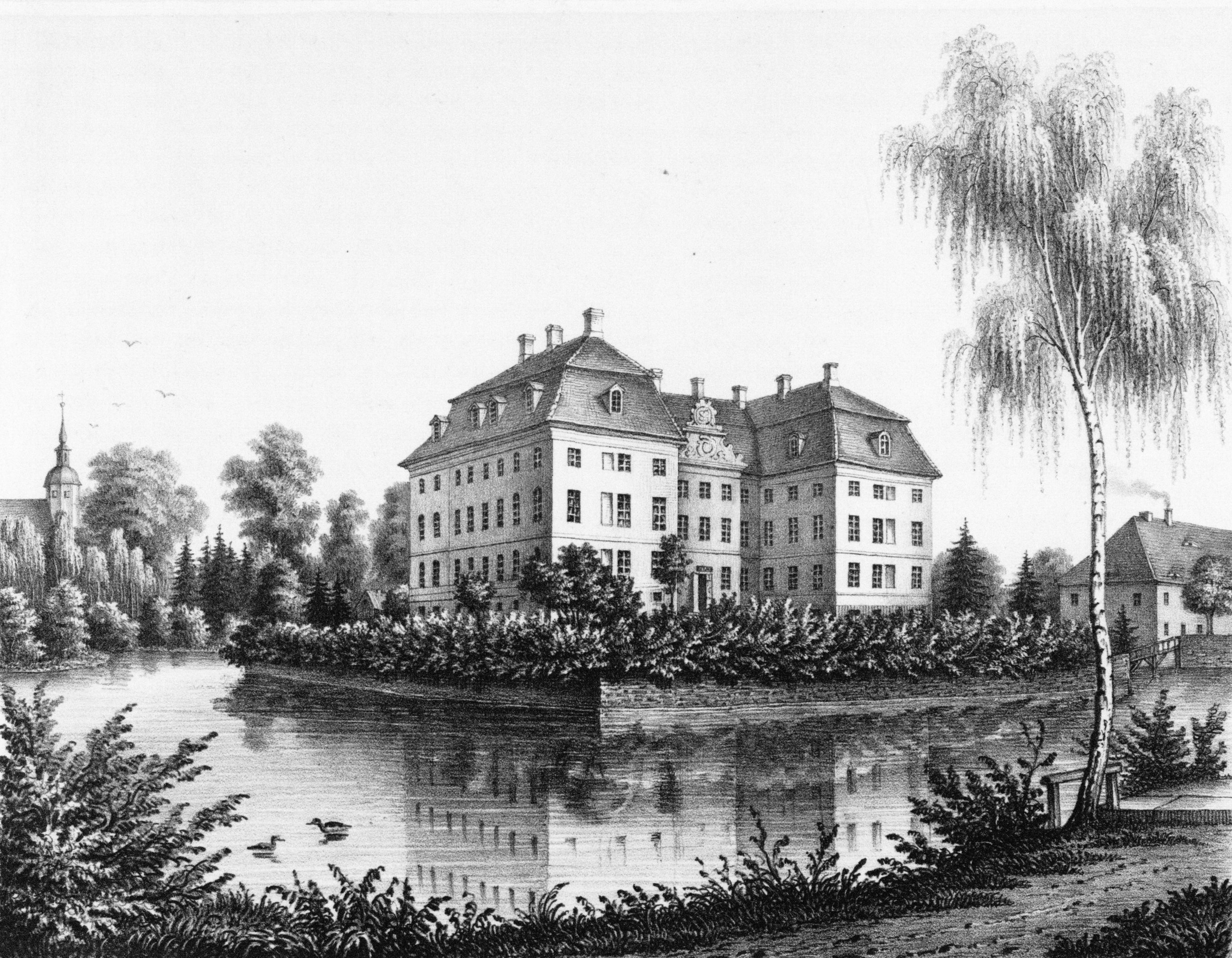 Wachau bei Radeberg aus: Album der Rittergüter und Schlösser im Königreiche Sachsen Meissner Kreis Section: II